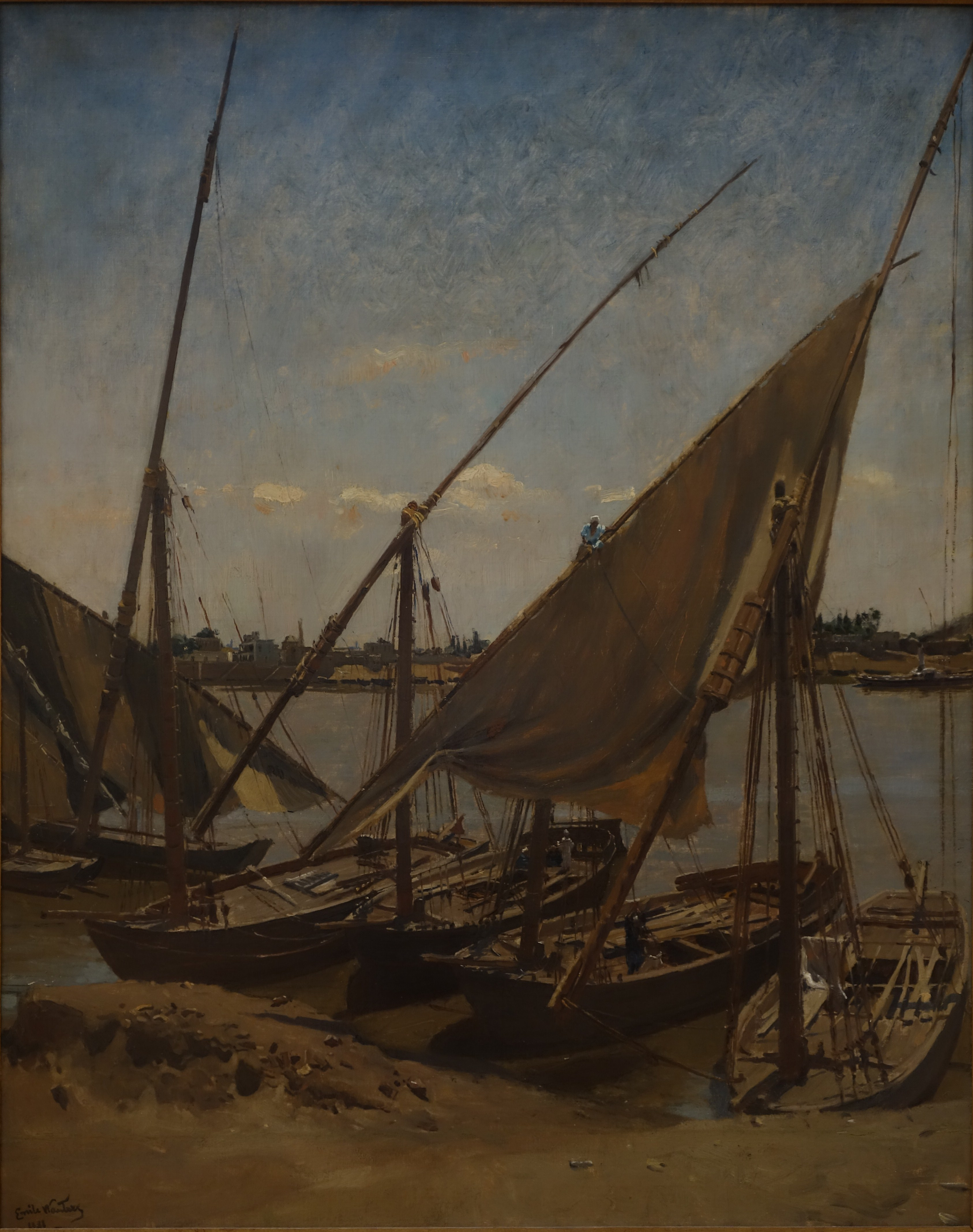 Émile Wauters, Boten op de Nijl, 1868 (voorstudie voor het Panorama van Cairo, collectie Charliermuseum)